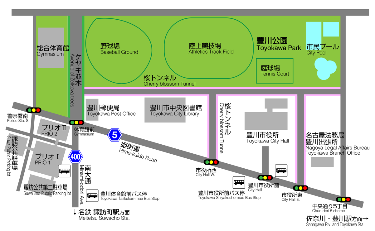 愛知県豊川市にある豊川公園の周辺地図 (Map of Toyokawa Park in Toyokawa, Aichi, Japan)